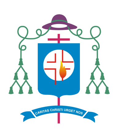 Huy hiệu Giám mục Giuse Vũ Duy Thống.